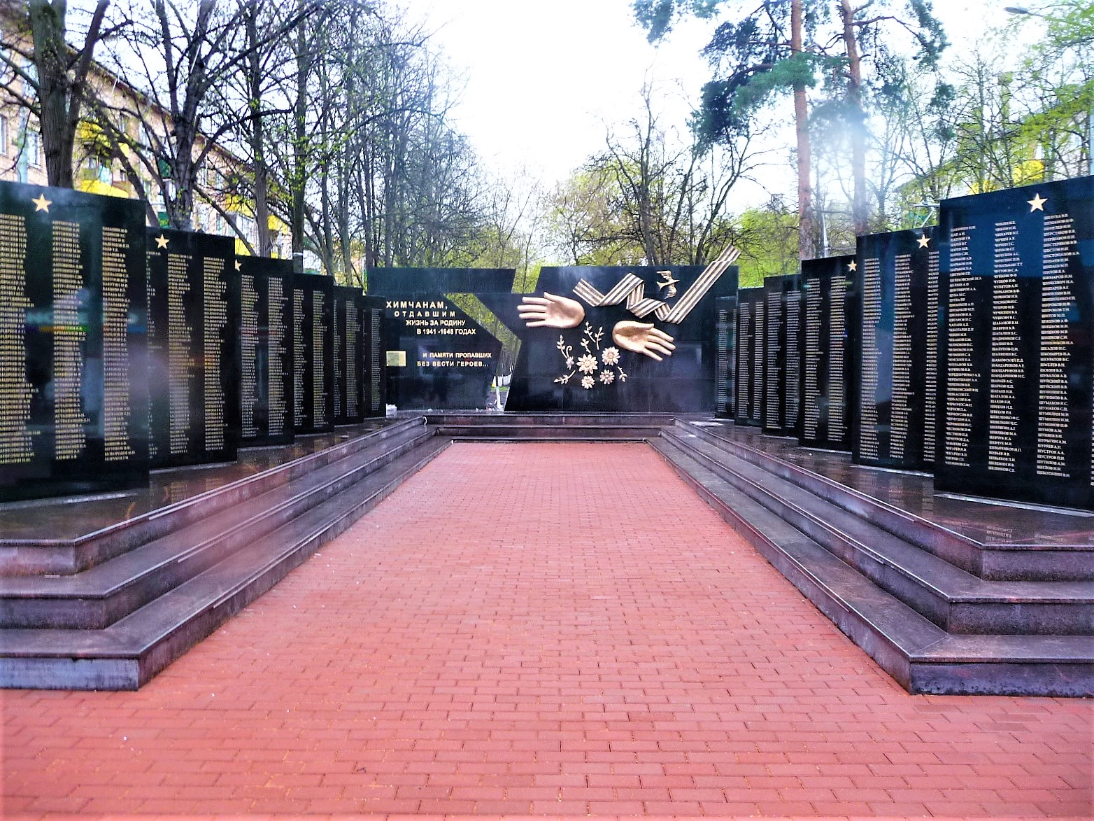 Памятник Химчанам, отдавшим жизнь за Родину в 1941-1945.